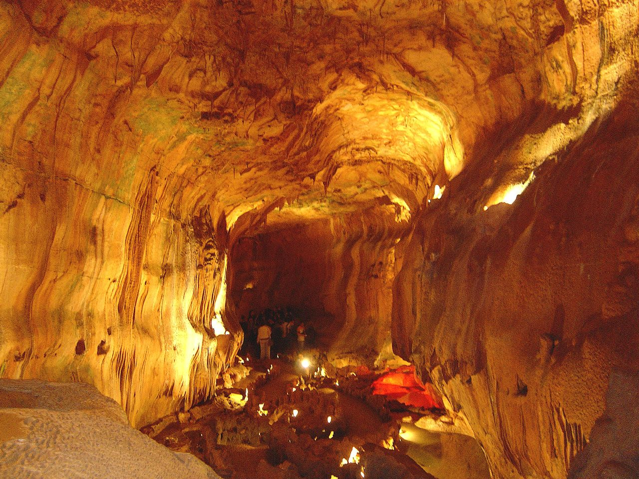 Grutas de Mira Daire - Portugal